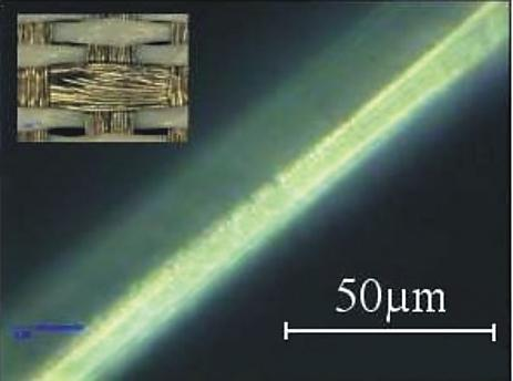 Galvanisierter Faden (mikroskopische Aufnahme)